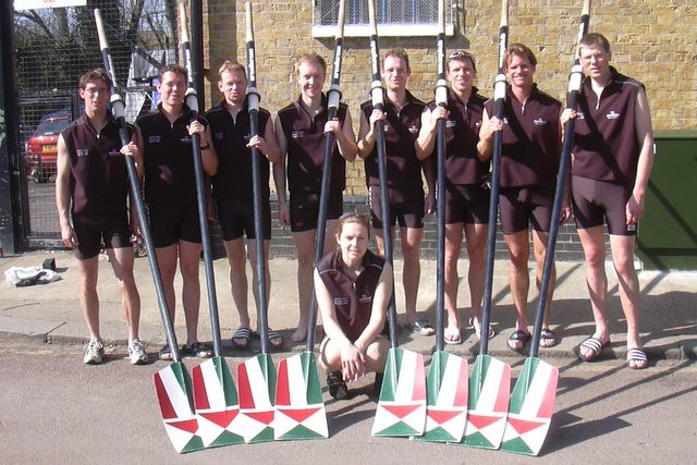 Angaria London Achter Crew 2005